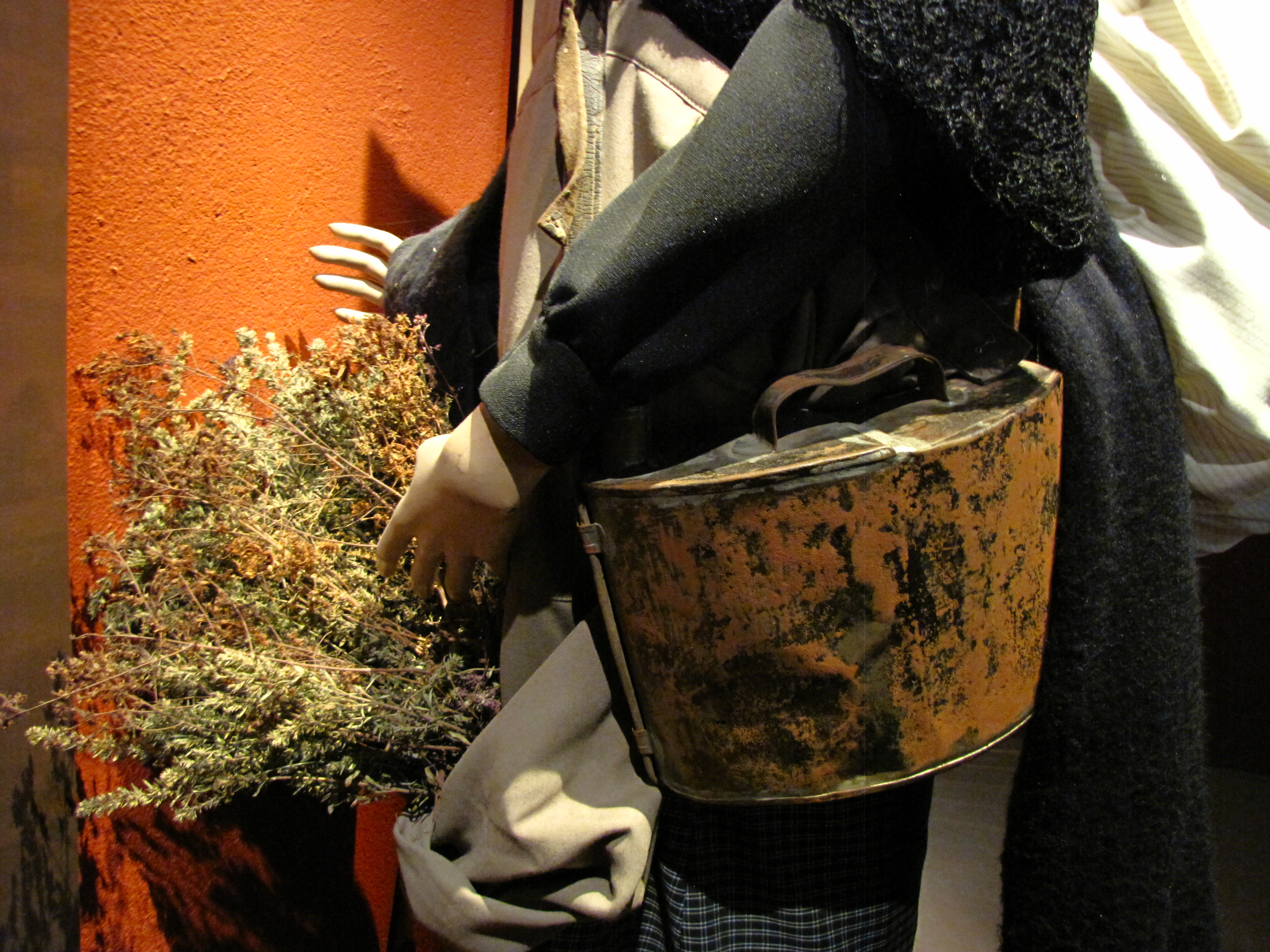 Lata en la que las trementinaires llevaban la trementina y otros aceites.